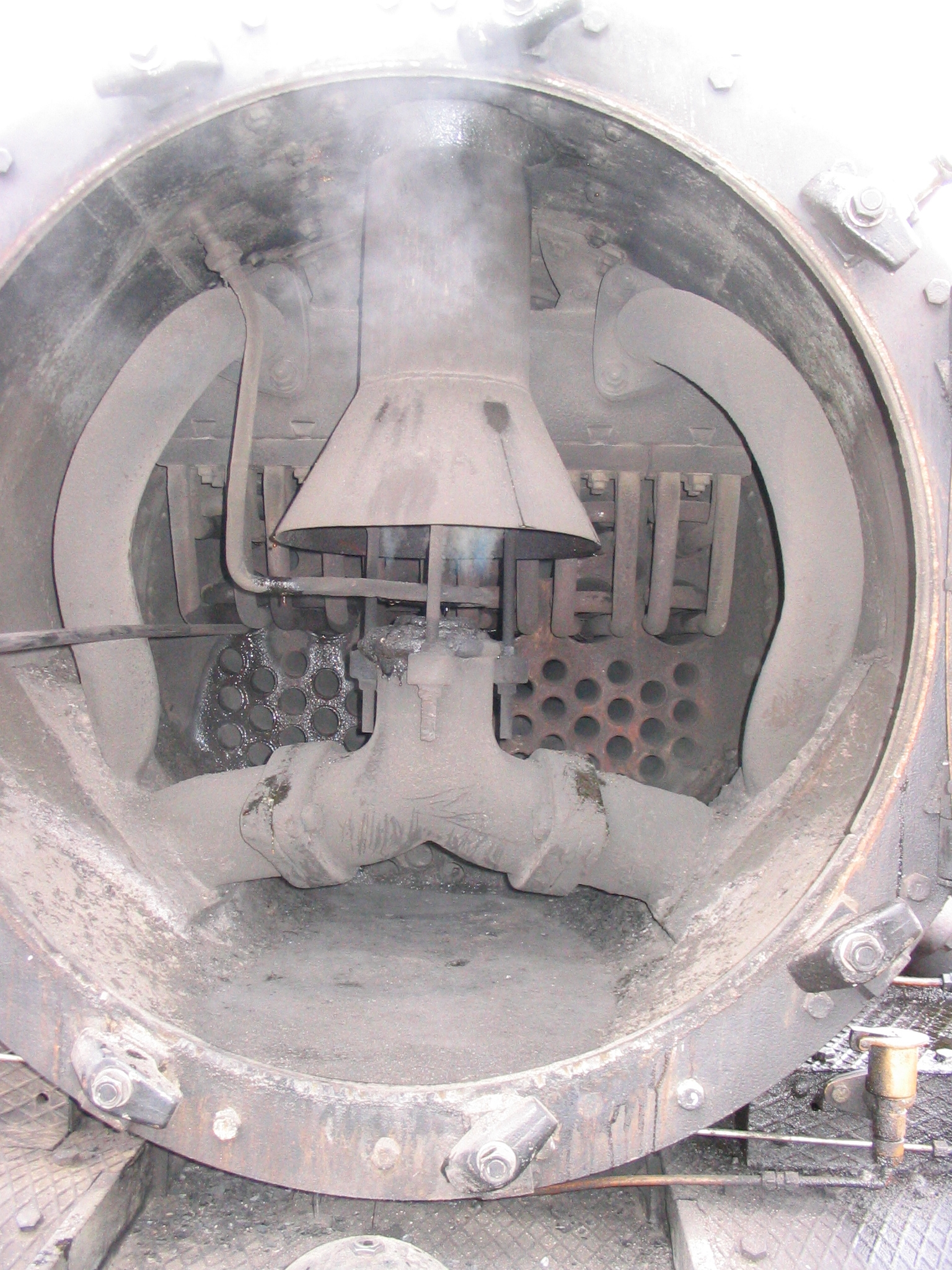 LWR6-höyryveturin nokikaappi avattuna.